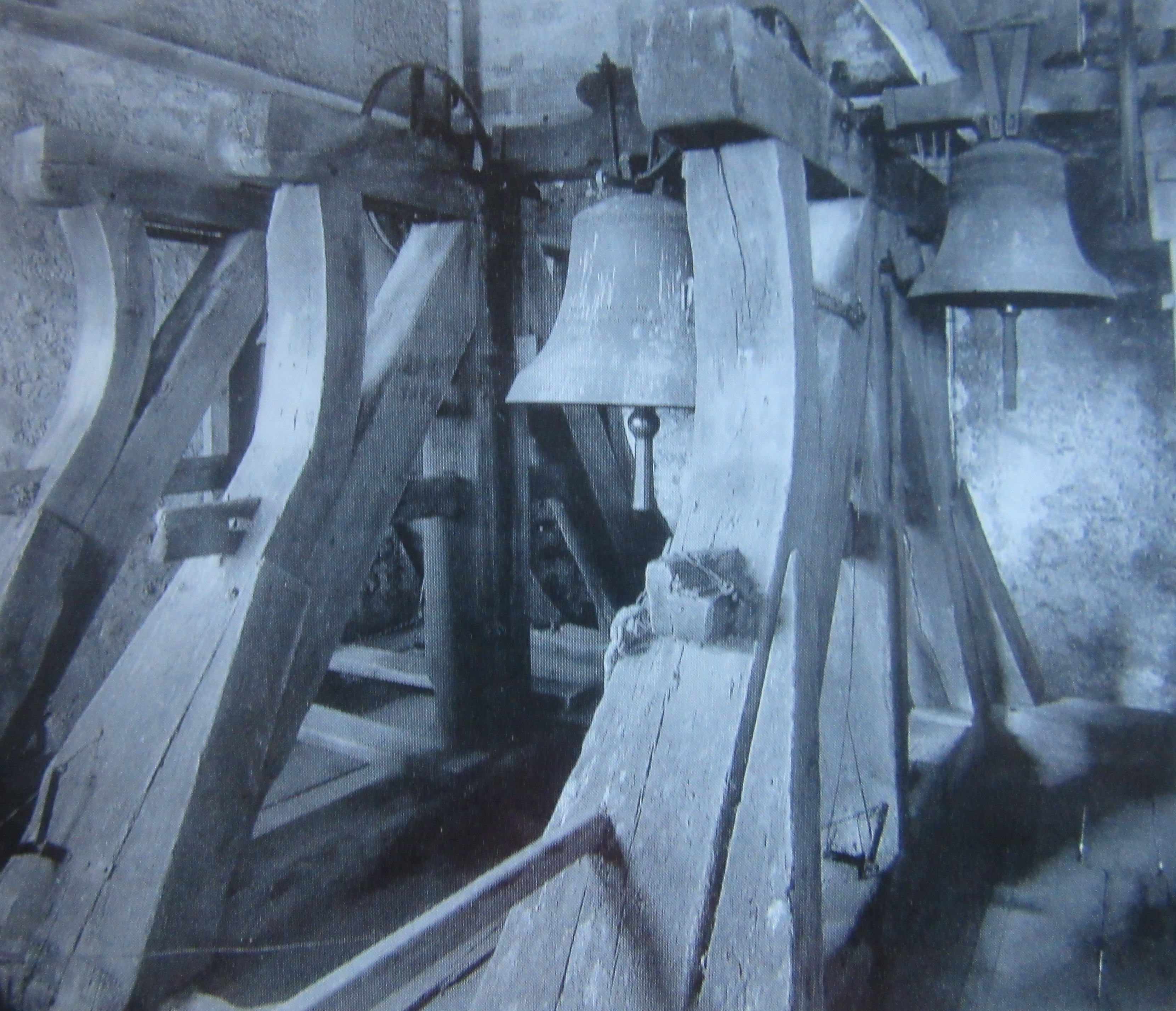 Glockenstuhl in der Michaelskirche (Ötisheim)